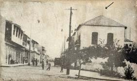 Primeiras instalações do BNU em Bissau